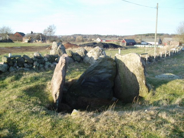 Den västra Klastorpsdösen